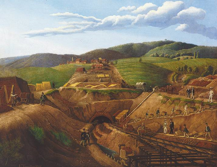 im Vordergrund lebhaftes Treiben auf einer Ziegelfabrik.